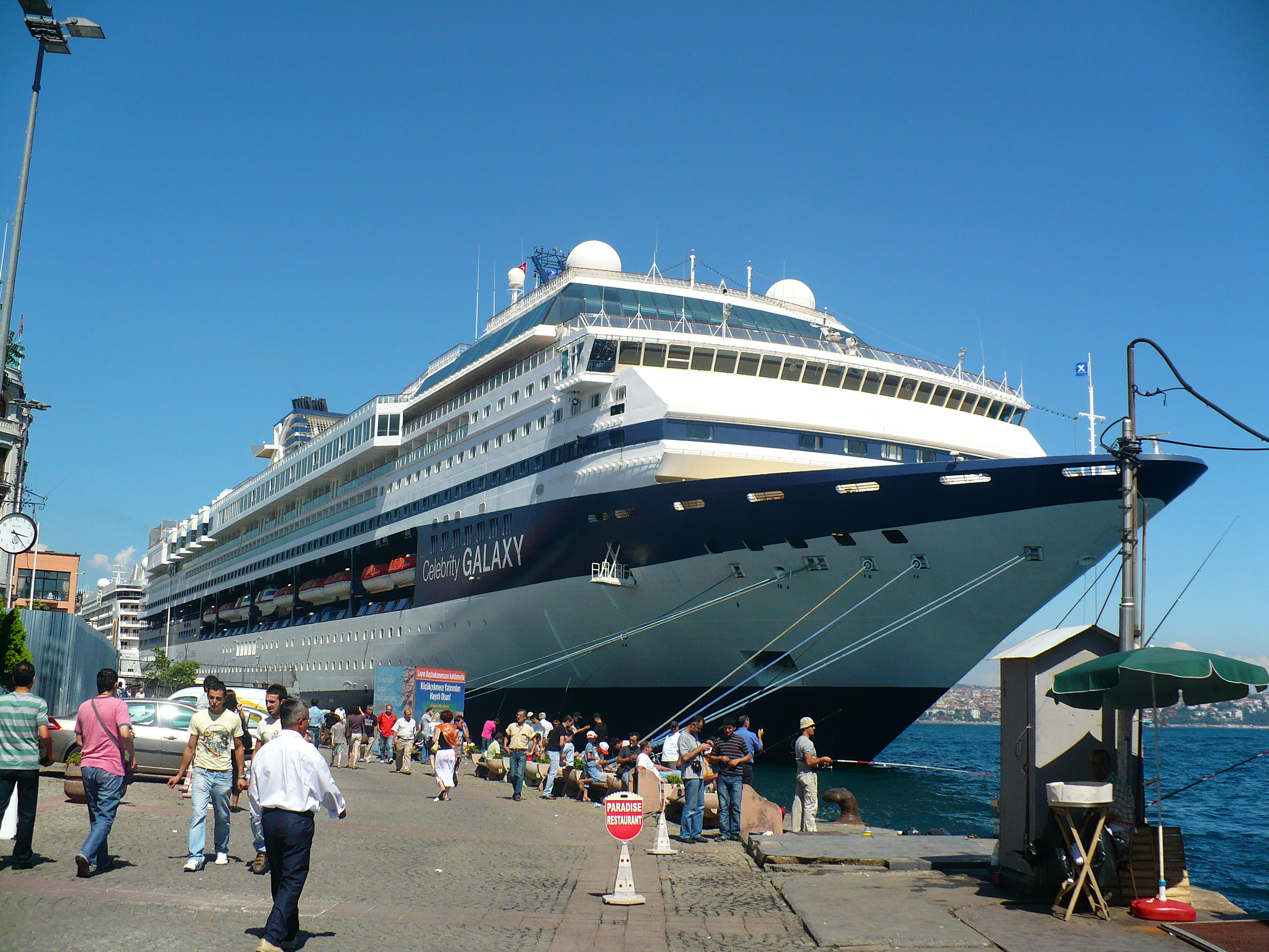 İstanbul'dan görüntüler